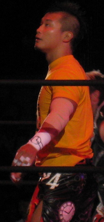 9月29日 神戸大会 「DESTRUCTION」 KUSHIDA